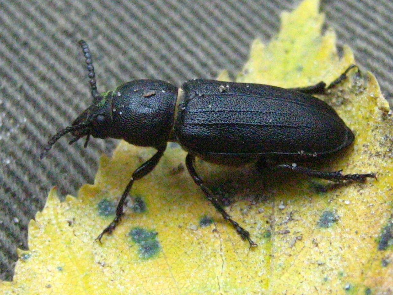 Der Waldbock, Spondylis buprestoides L., gefunden und fotografiert im Stadtwald Nauen (Brandenburg, Germany)